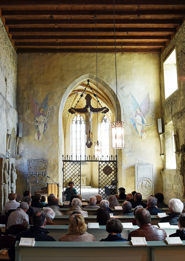 Blick vom Langhaus in den Chor der Frauenkirche in Unterriexingen